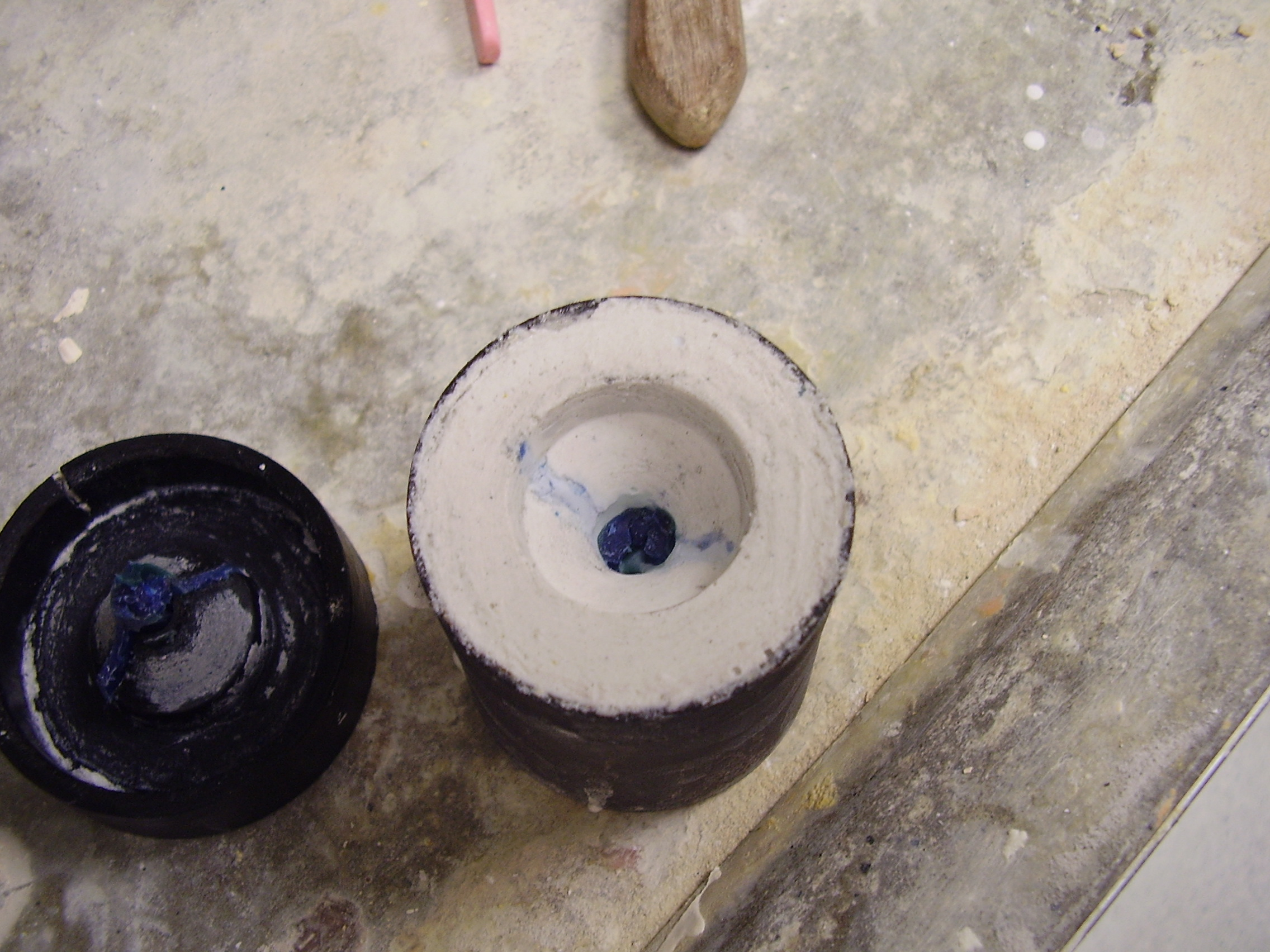 making of inlays, Gussmuffe, Einbettmasse (weiß), das in Wachs modellierte Objek (Krone oder Inlay oder Teilkrone) ist möglichst im Zentrum der Muffe platziert, der Gussstift reicht bis nach oben und mündet in einem Gusskegel. Der Gußkegel wird in die Einbettmasse modelliert, indem der Deckel, auf den die Gußßstifte mit dem Inlay aufgewachs sind eine Kegel-Form hat. nach dem Aushärten der Einbettmasse (ca. 1 Std.) kann dann der Deckel (mit sanfter Gewalt) abgenommen werden. Das Wachs wird in einem speziellen Ausbrennofen bei ca. 800°C entfernt, es schmilzt, läuft teilweise raus bzw. verbrennt rückstandslos. So bleiben in der Einbettmasse leere Kanäle und Hohlformen, in die dann das flüssige Gold gegossen wird. Damit das Gold auch gut alle schmalen Ecken und Winkel der Krone ausfließt, wird die Gussmuffe im Brennofen sehr stark erhitzt (ca. 900°C), so das das Gold nicht beim Gießen auskühlt und vorzeitig erstarrt.